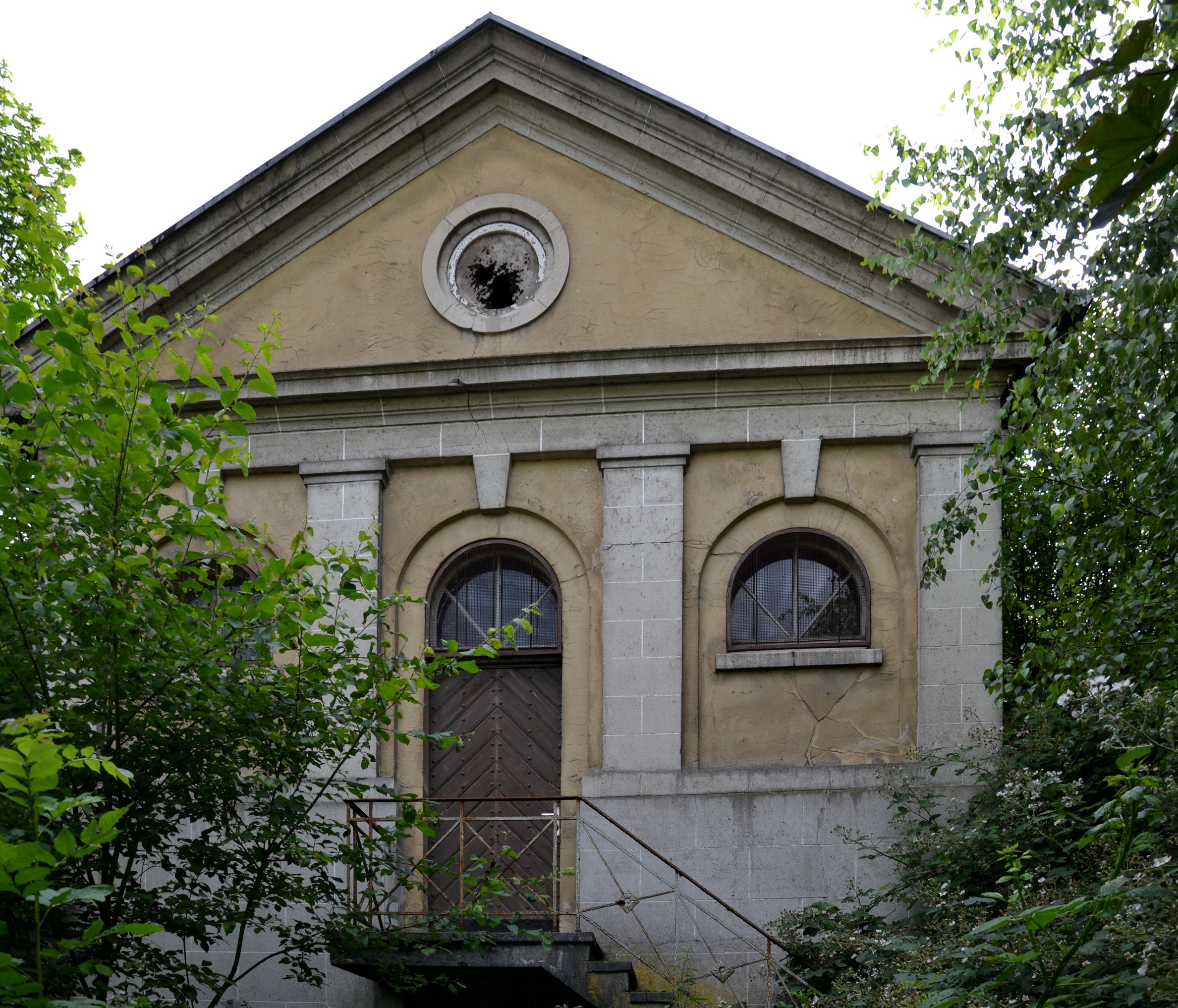 Wasser-Hochbehälter der Fa. Krupp, zur Versorgung der Villa Hügel, der Krupp-Wohnkolonien und der Krupp Gussstahlfabrik